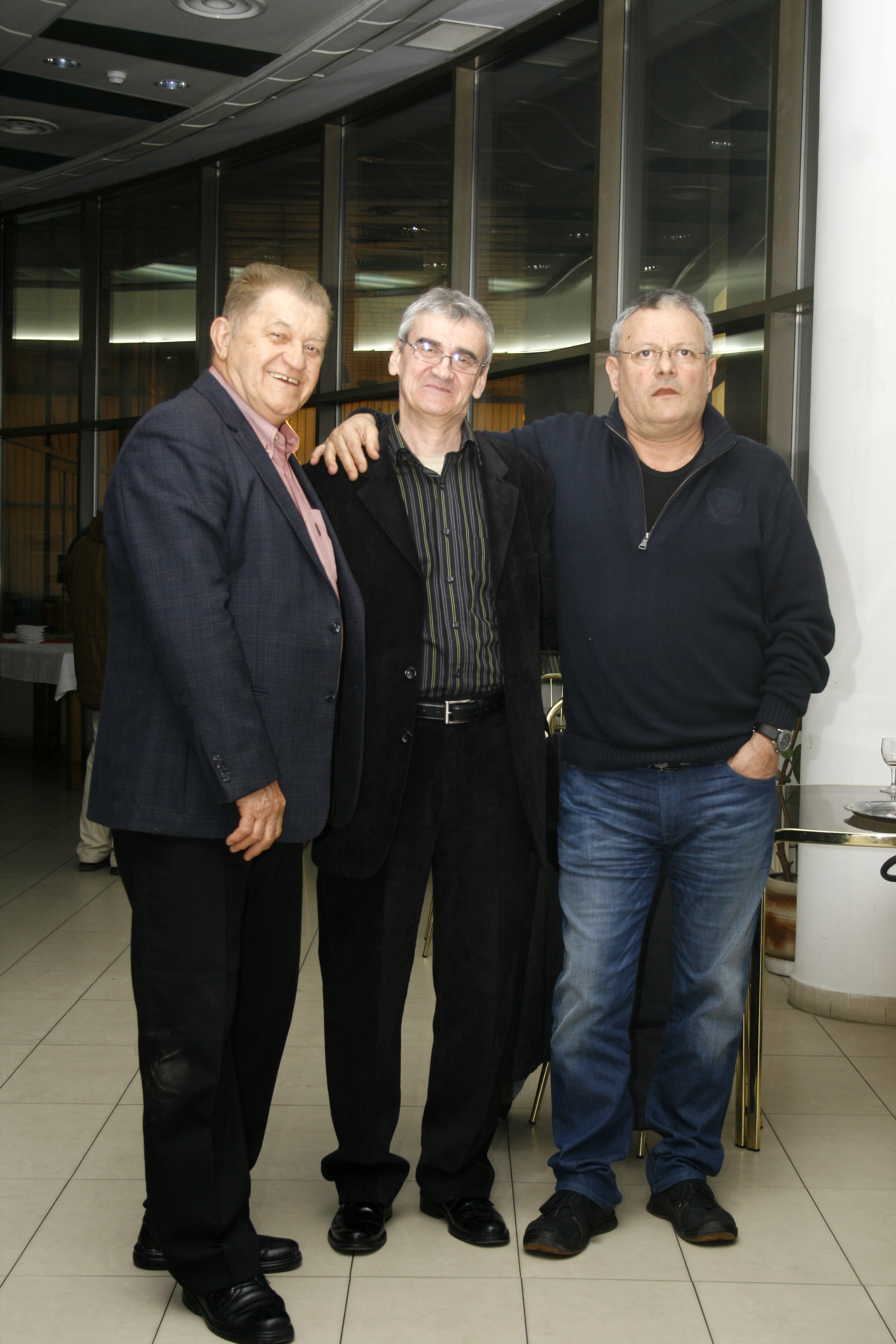 Corneliu Ionescu cu Dorel Vișan (stânga) și Șerban Marinescu regizor (dreapta) 2012